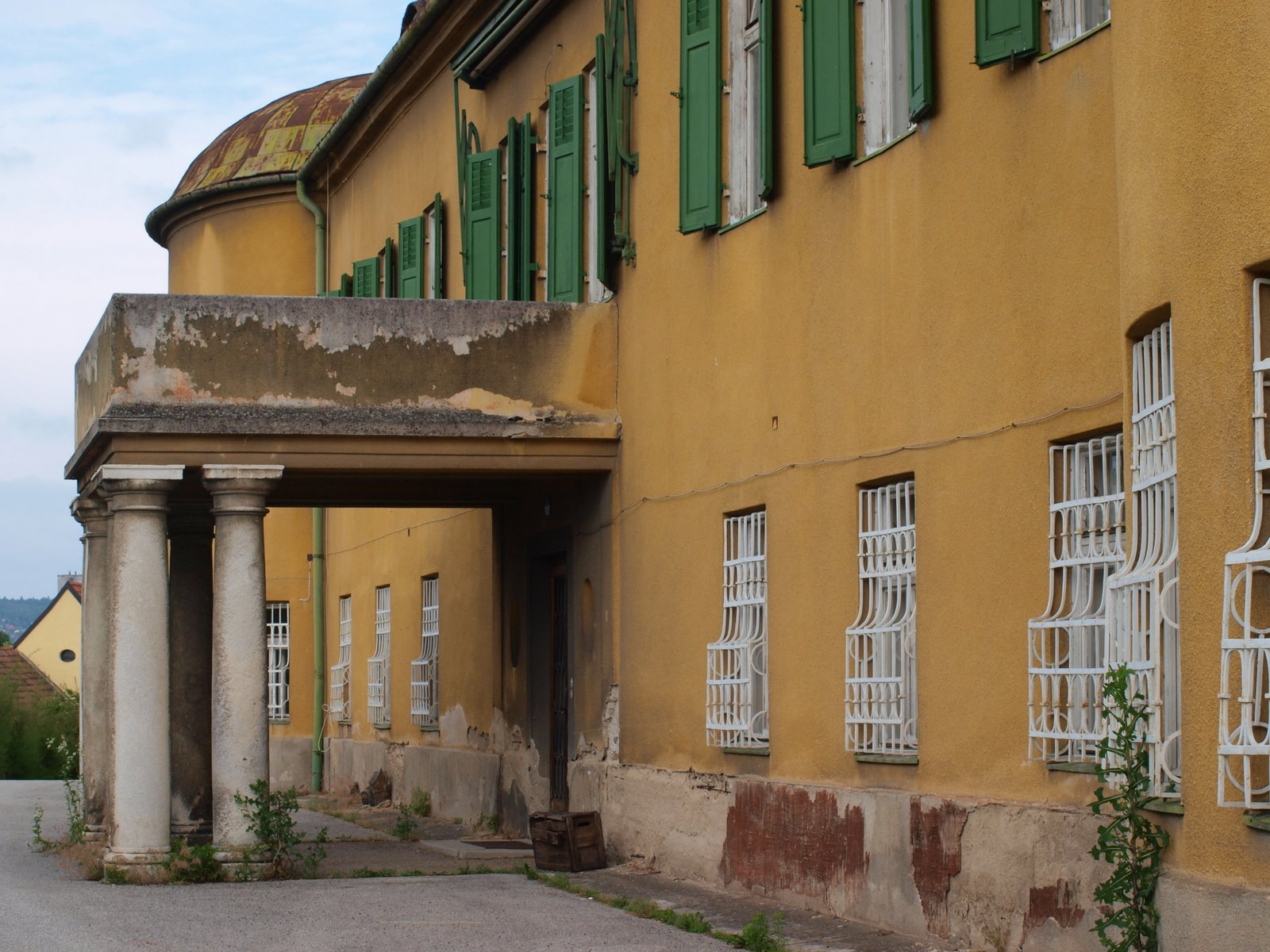 Gainfarn bei Bad Vöslau, Niederösterreich (Lower Austria)